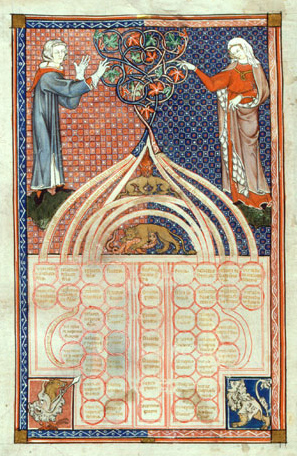 Esta imagen pertenece a un ejemplar manuscrito del libro Concordia Discordatium Canonum original perteneciente al s.XIII.